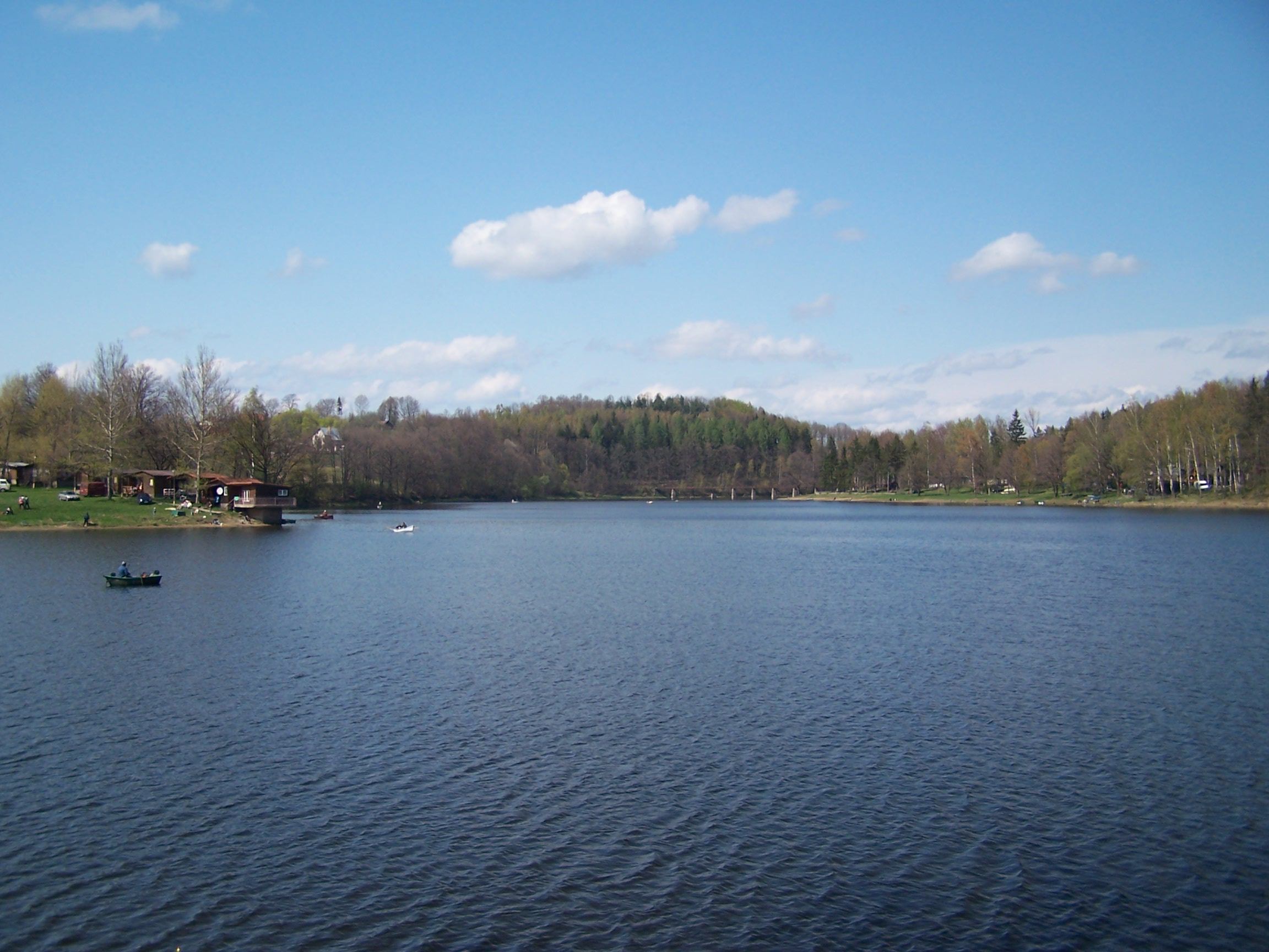 Jezioro Złotnickie